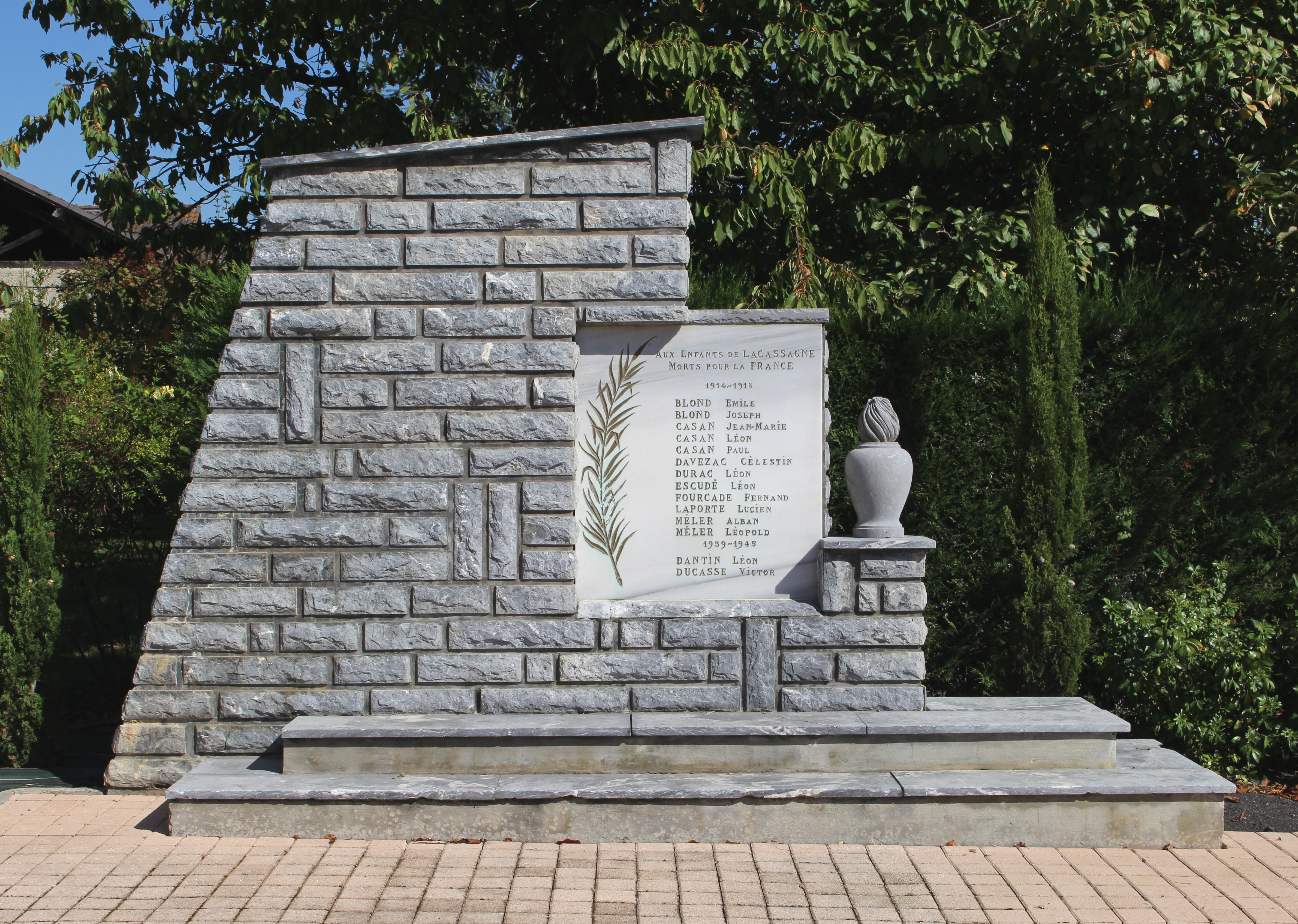 Monument aux morts de Lacassagne (Hautes-Pyrénées)